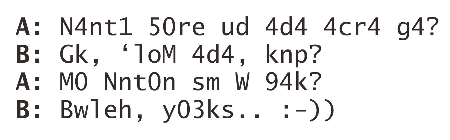 Teks percakapan bahasa Alay diambil dari Kompas Tekno: Dalam fon Lucida Typewriter